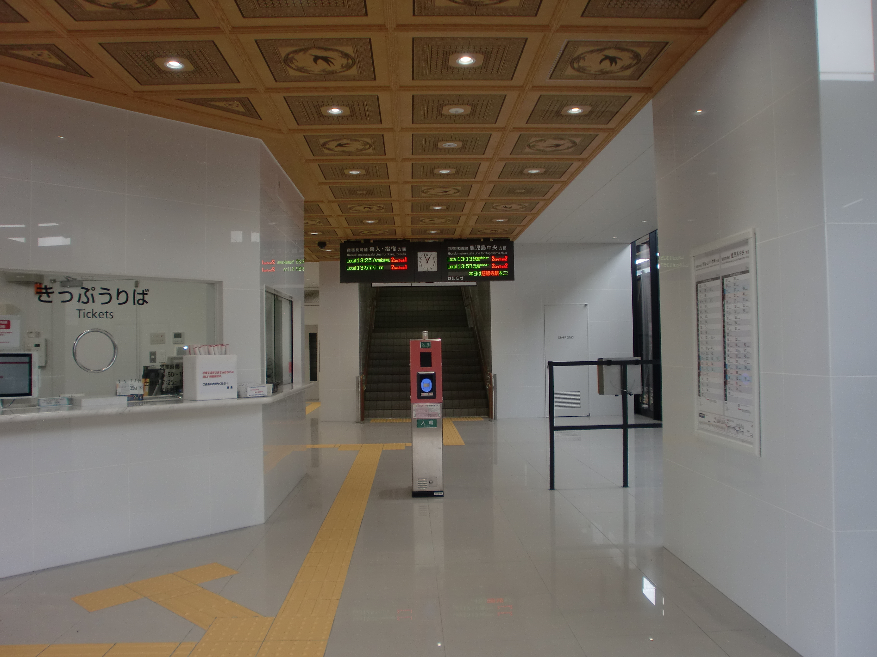 慈眼寺駅の改札